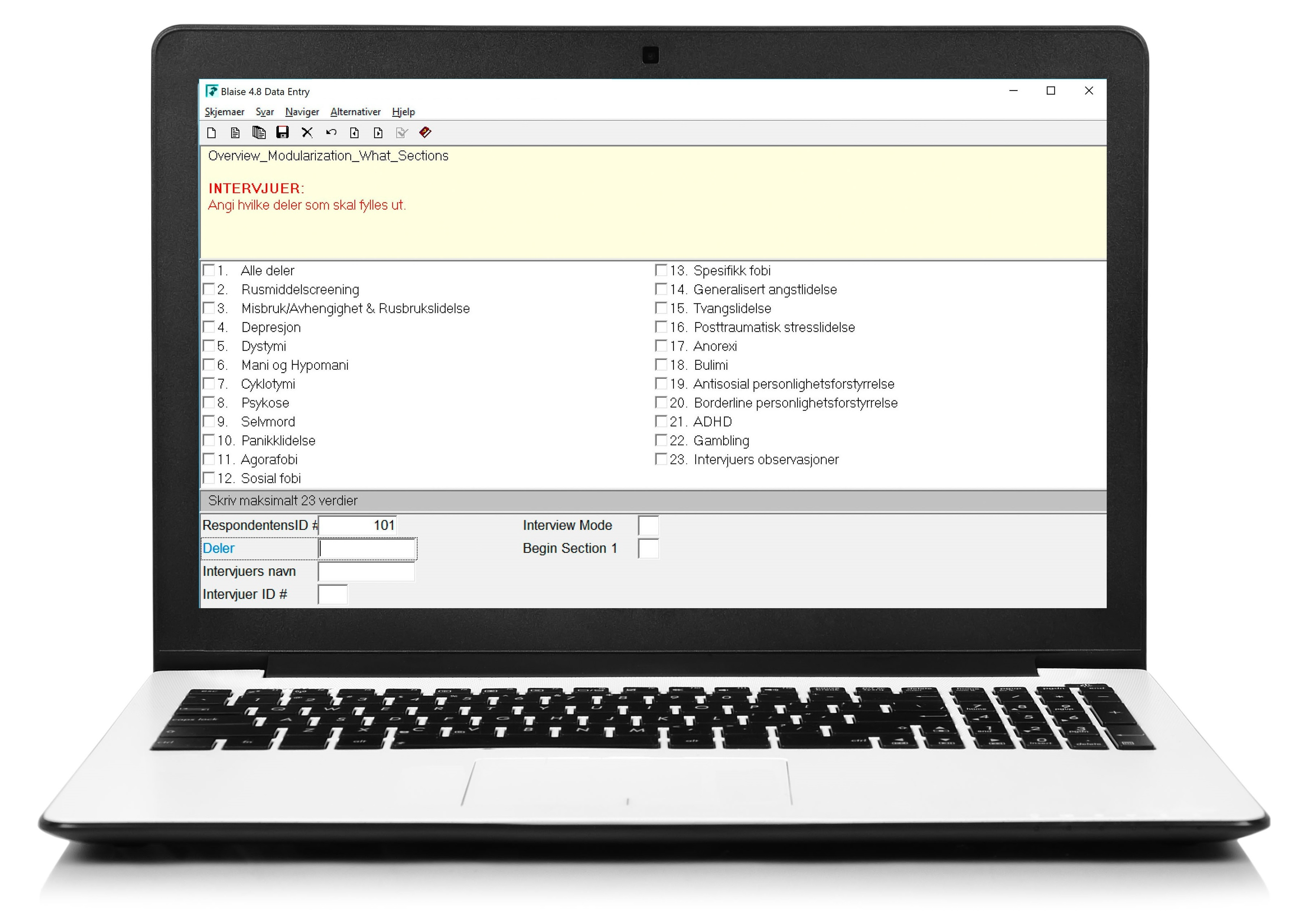 Skjermbilde fra PRISM-5